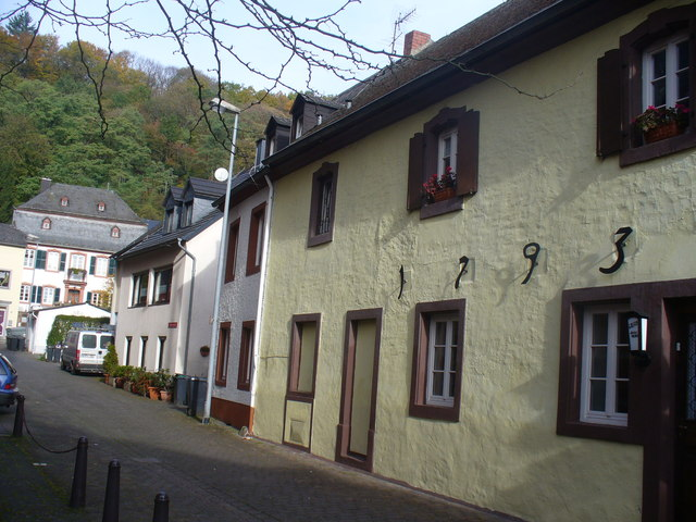 Gasse in Ehrang (Lane in Ehrang) - Fröhlicherstraße 21